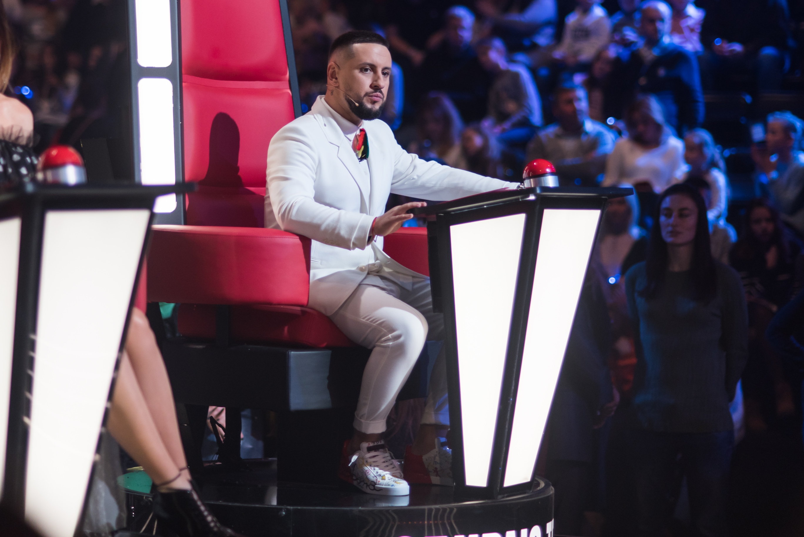 Финал Голос. Дiти 4. MONATIK